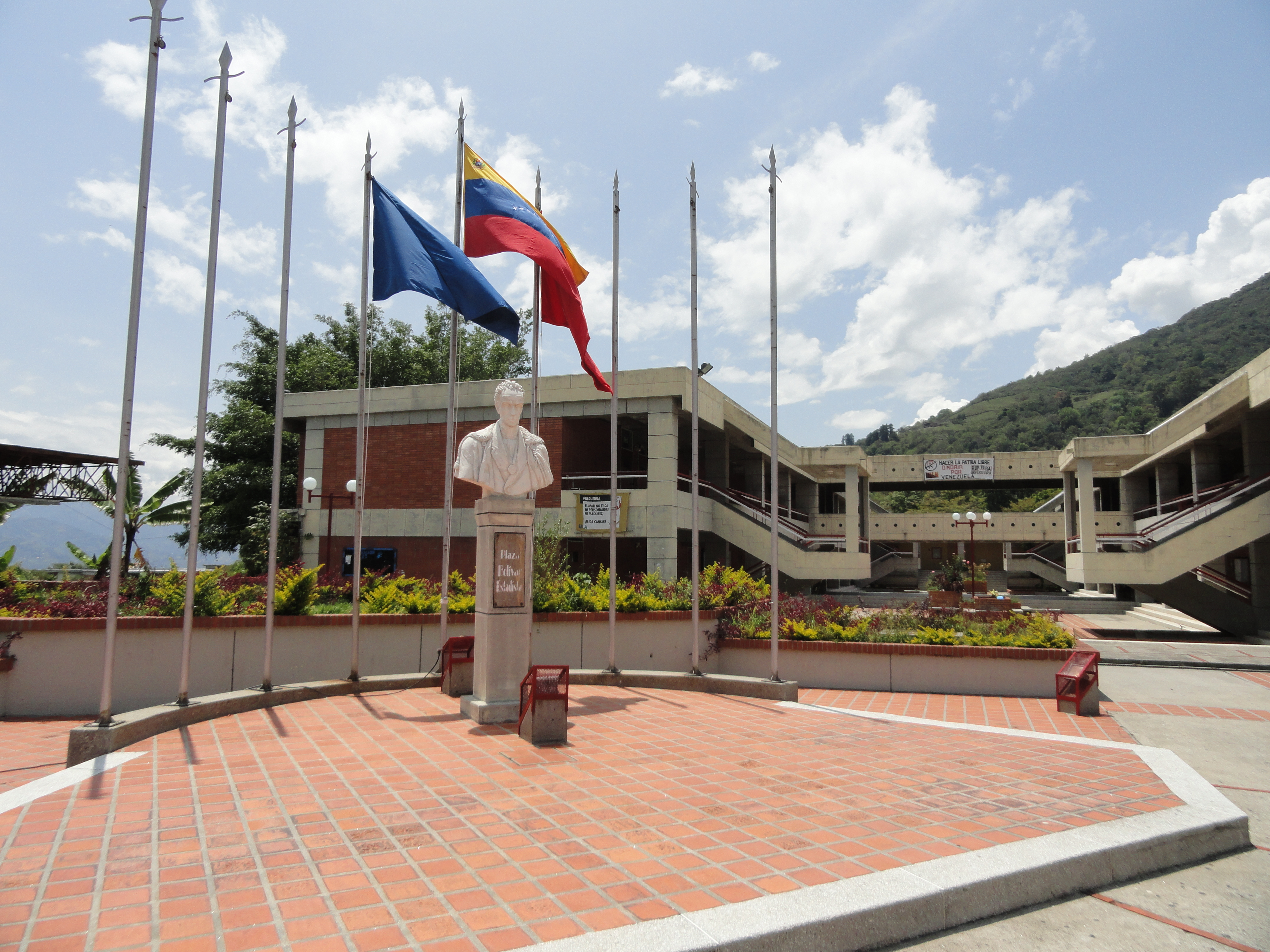 Edificios de facultades y escuelas de la Universidad de Los Andes, ULA